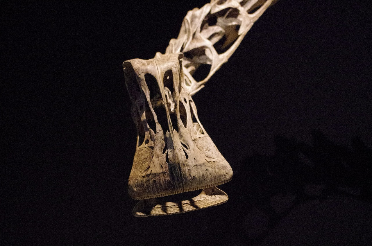 _IGP9979